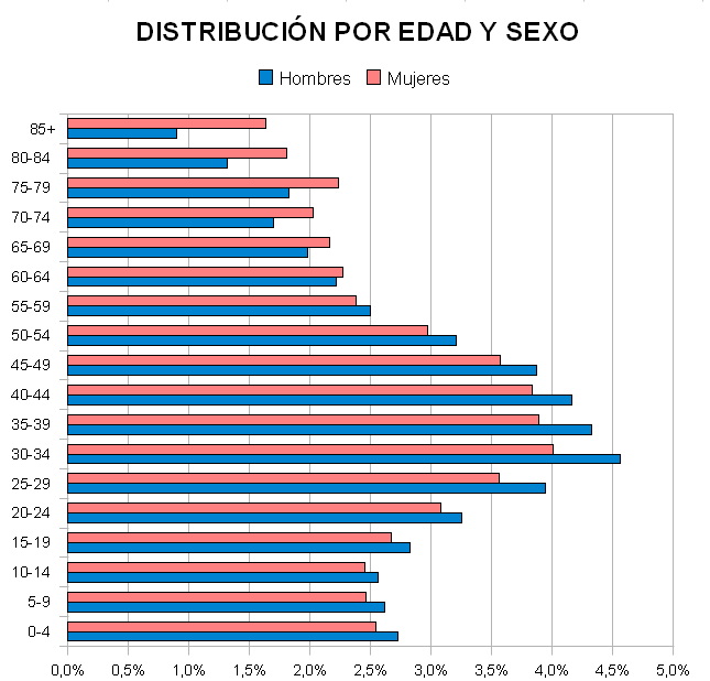 Gráfico de la distribución de población de Castilla-La Mancha del año 2010, por grupos quiquenales y sexo